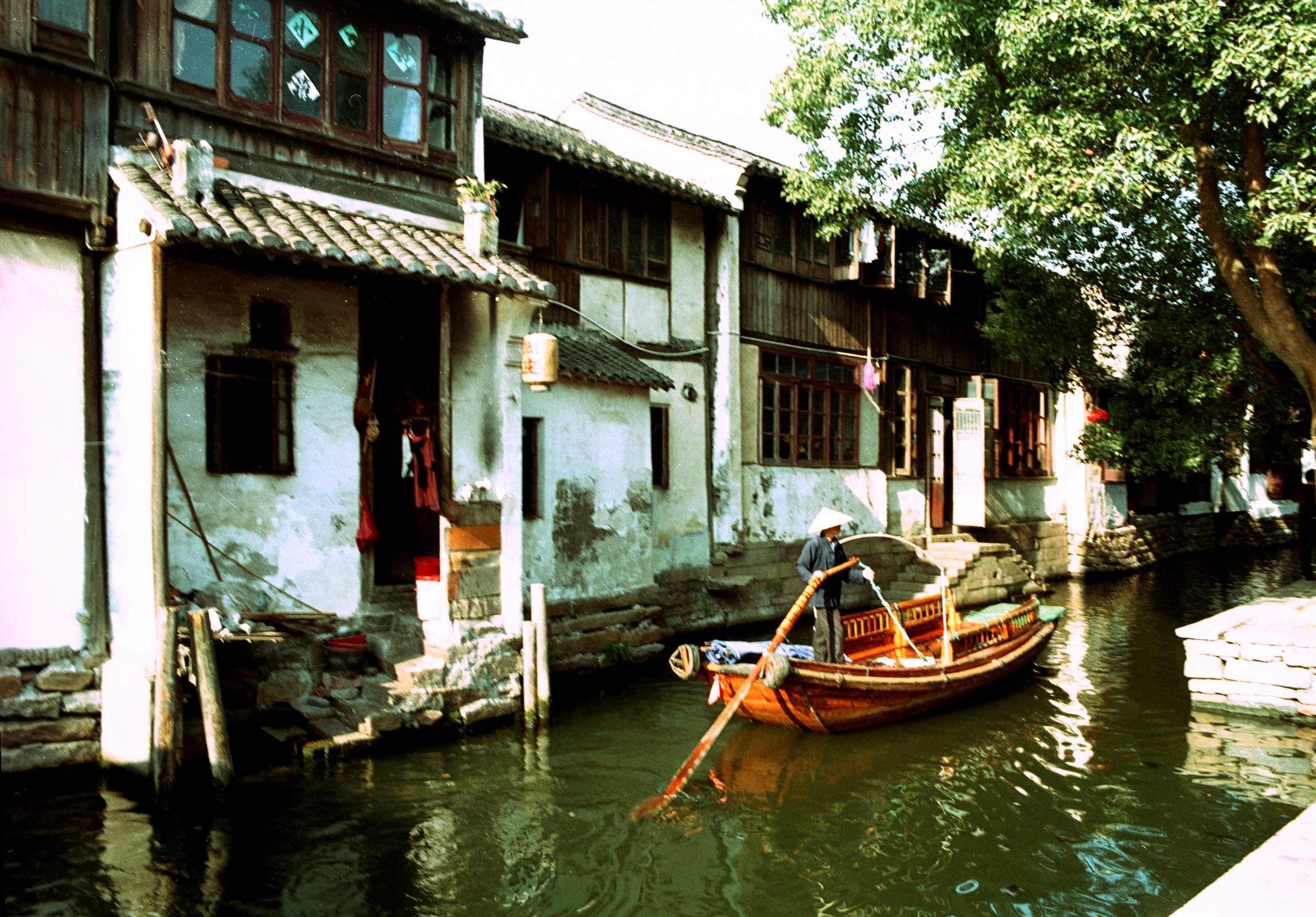 周庄